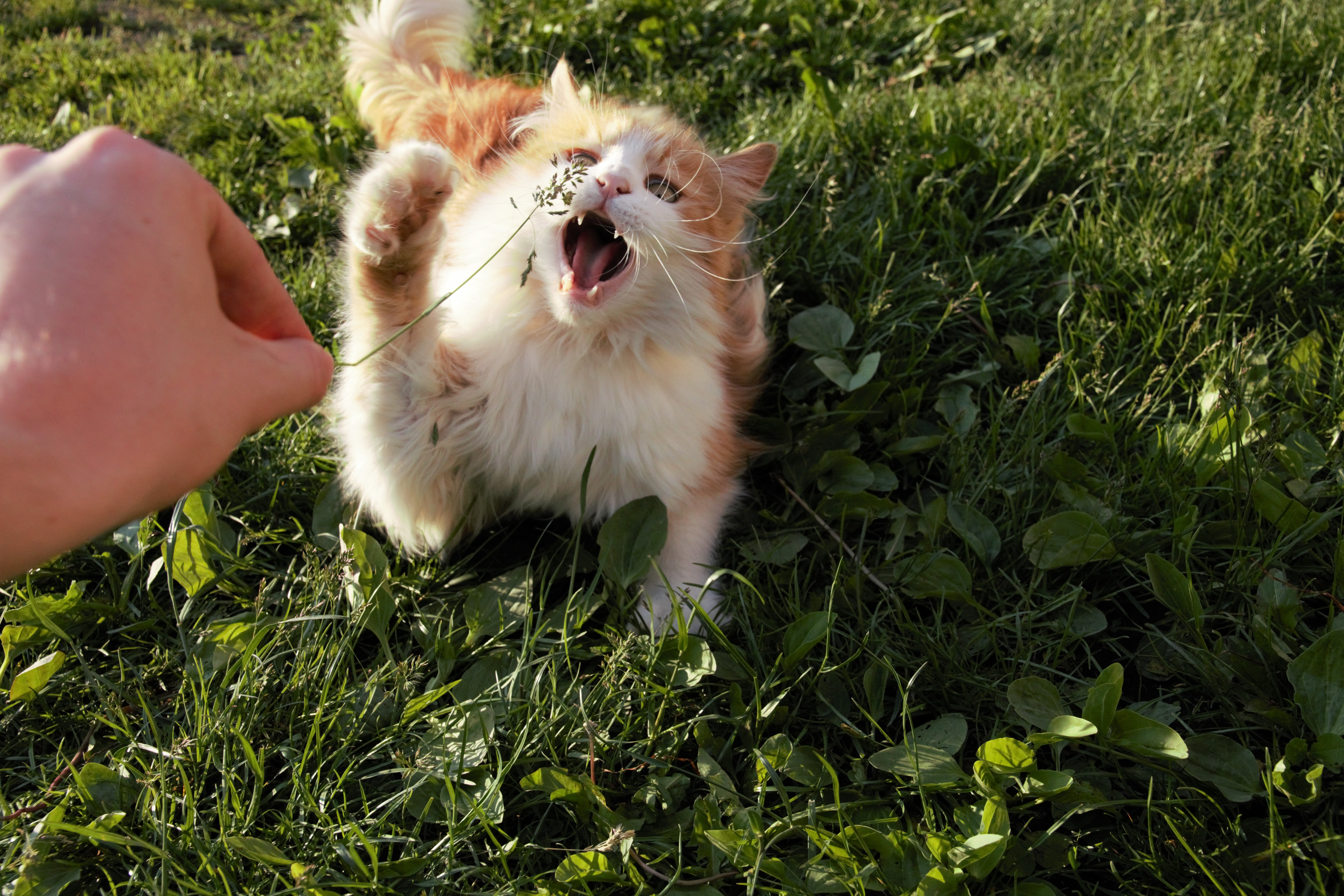 Spielverhalten einer Katze